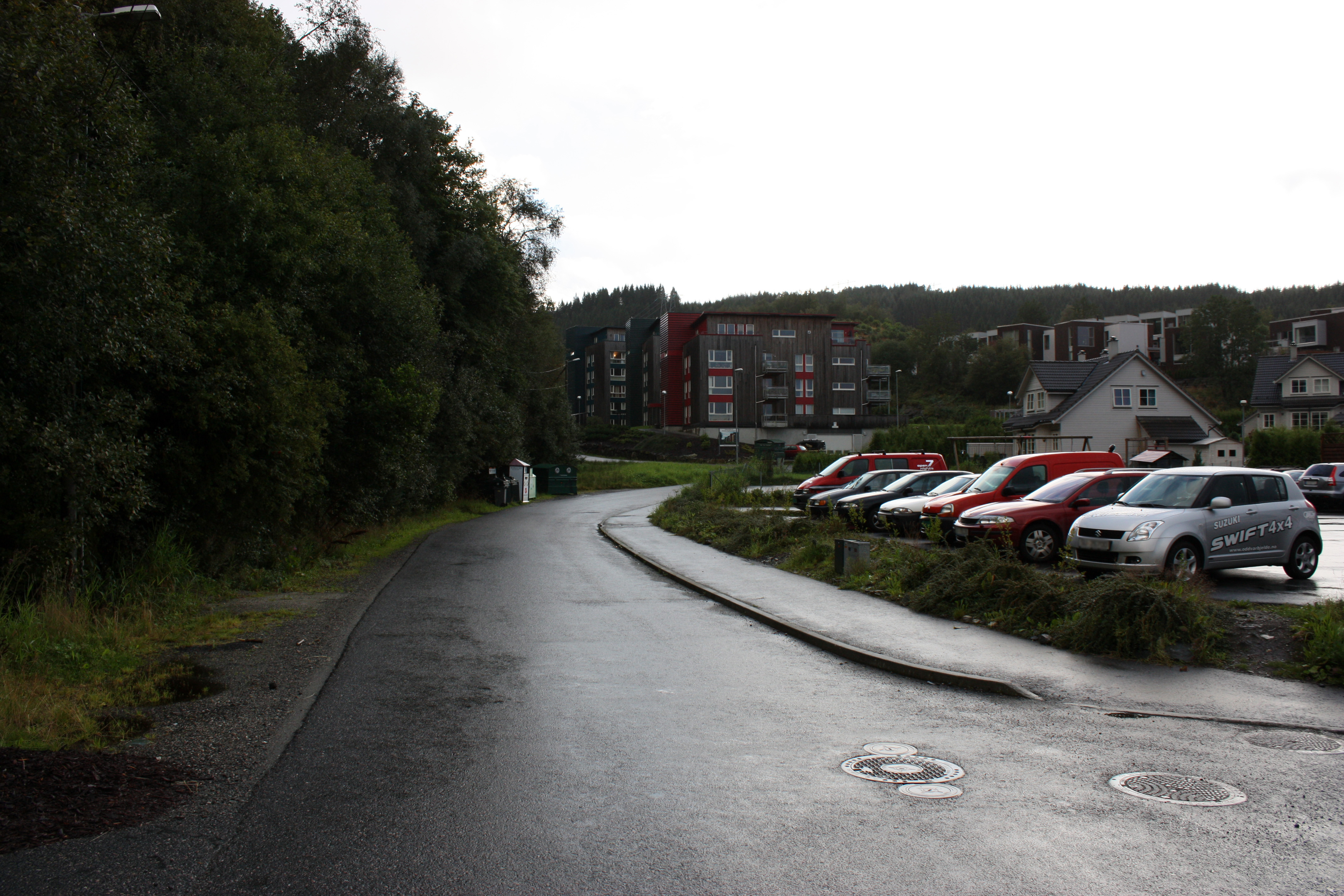 Apeltunhaugane, Fana, Bergen.